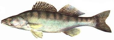 Sandacz